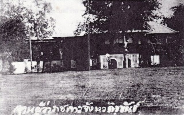 จวนผู้ว่าราชการจังหวัดขุขันธ์